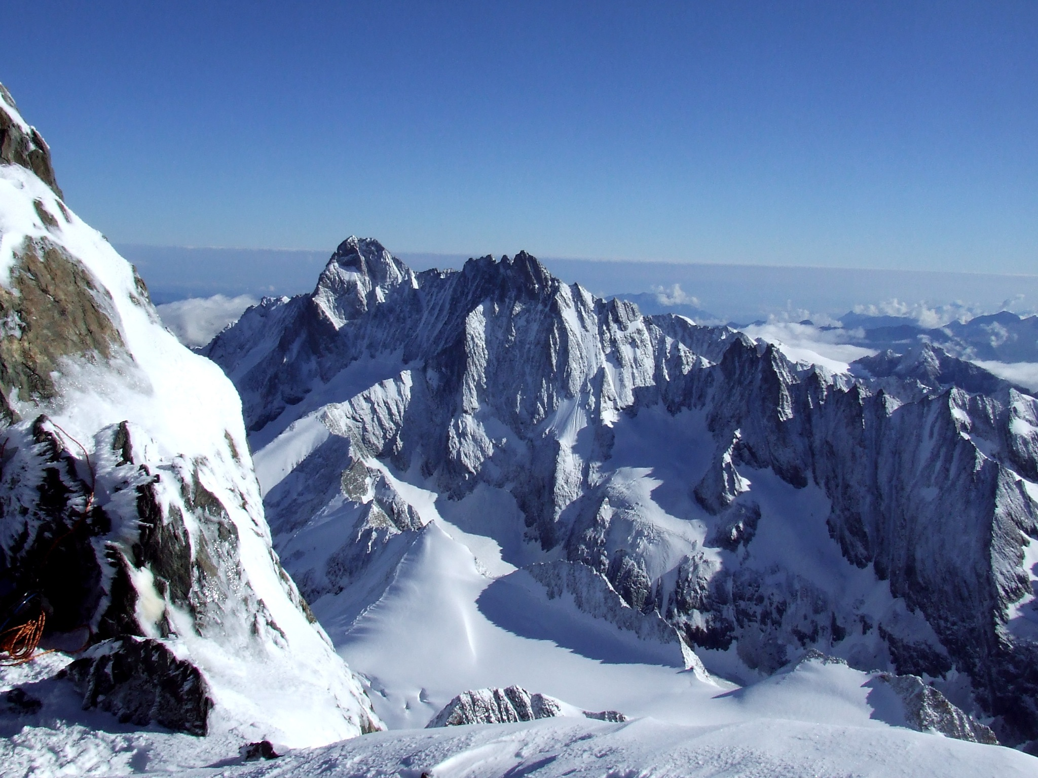 Lauteraarhorn